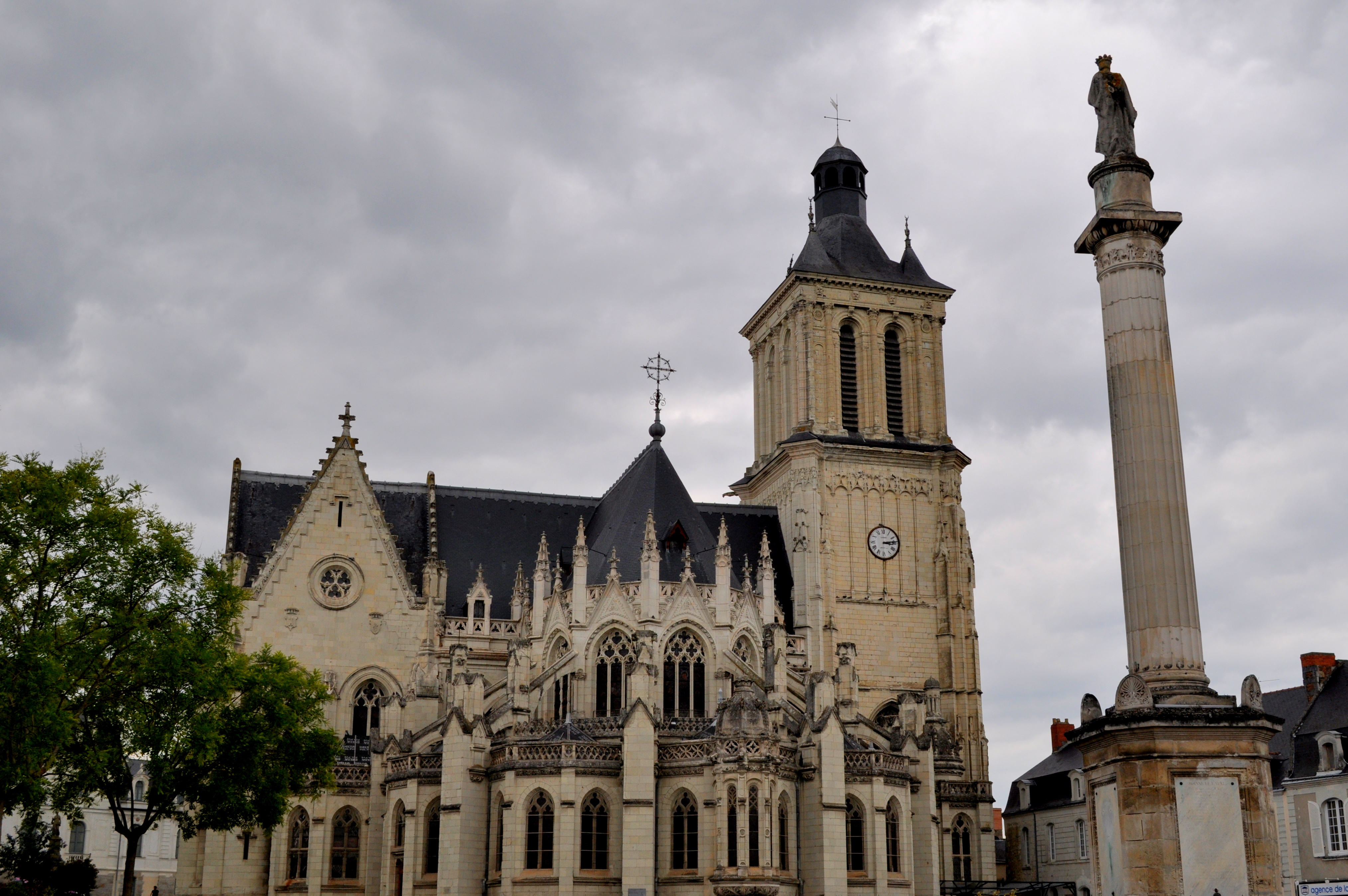 Beaufort-en-Vallée - Église Notre Dame (Maine-et-Loire)